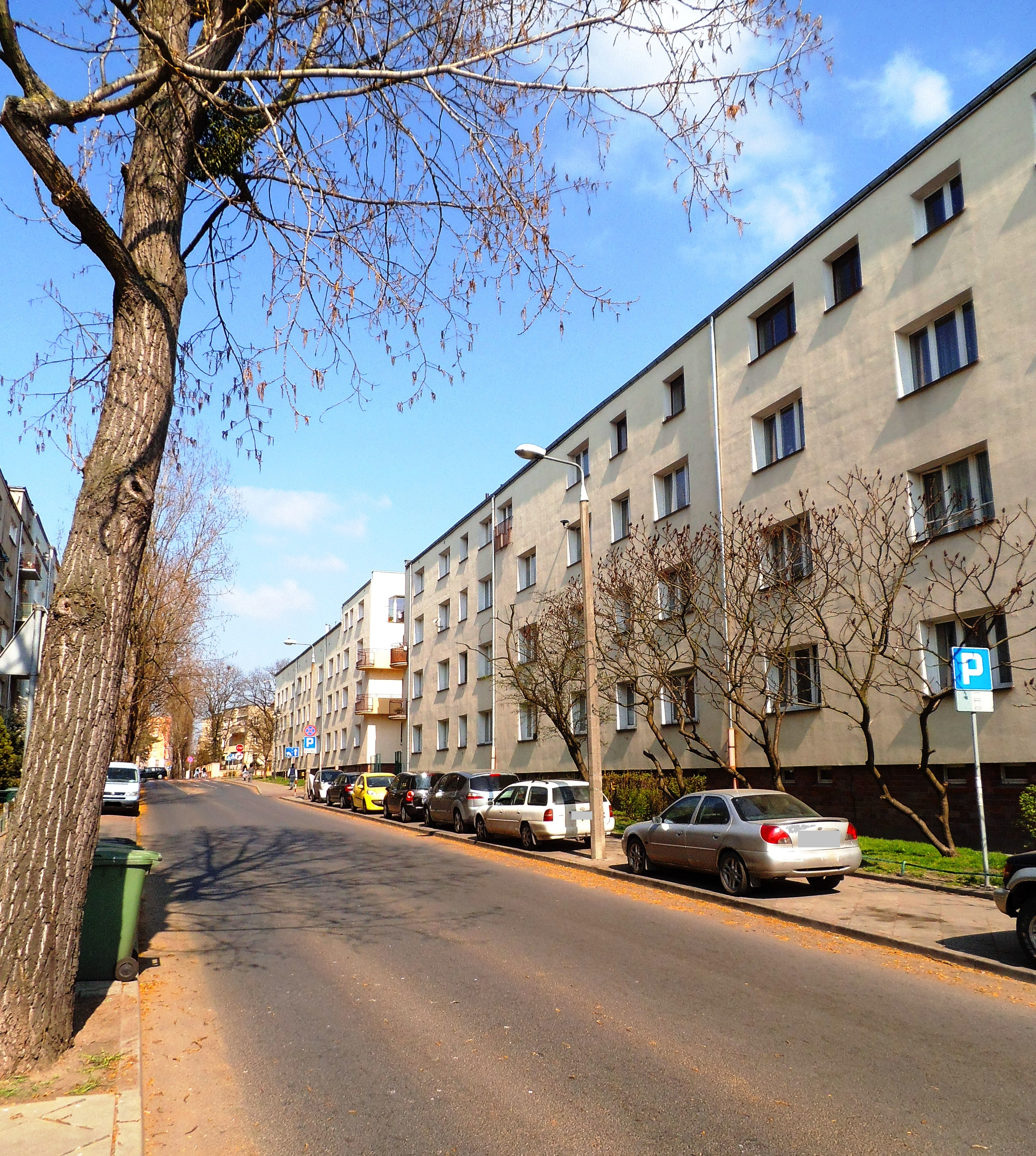 Ulica Matejki w Toruniu1